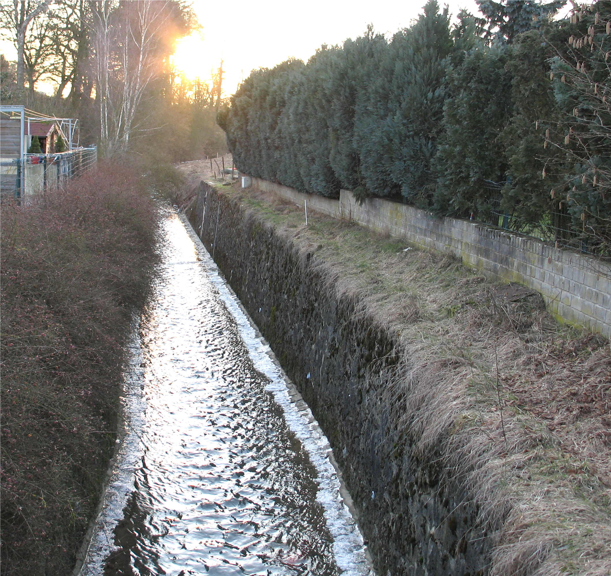 D'Faulbaach zu Mamer